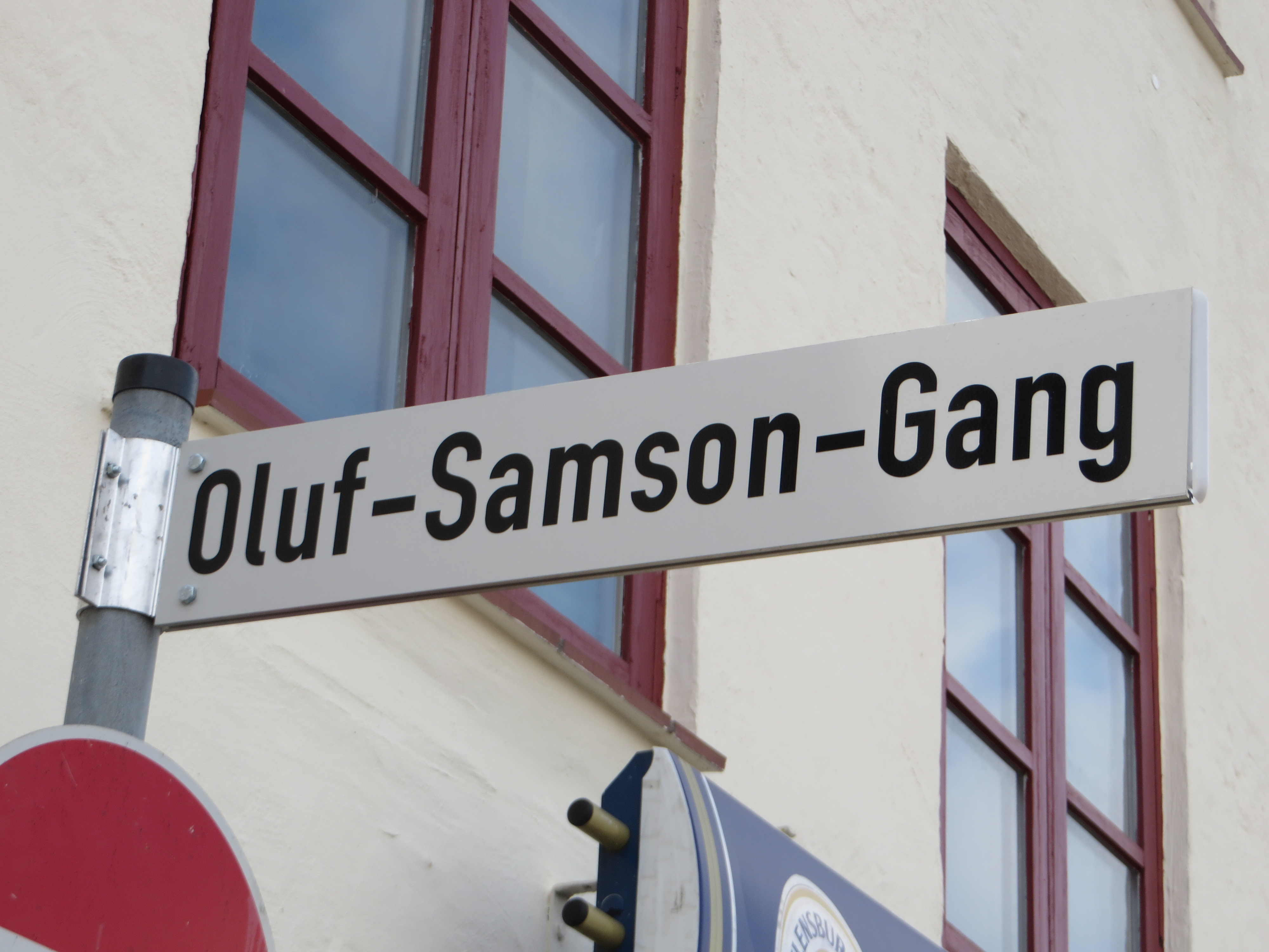 Straßenschild vom Oluf-Samson-Gang, Flensburg, Bild 01